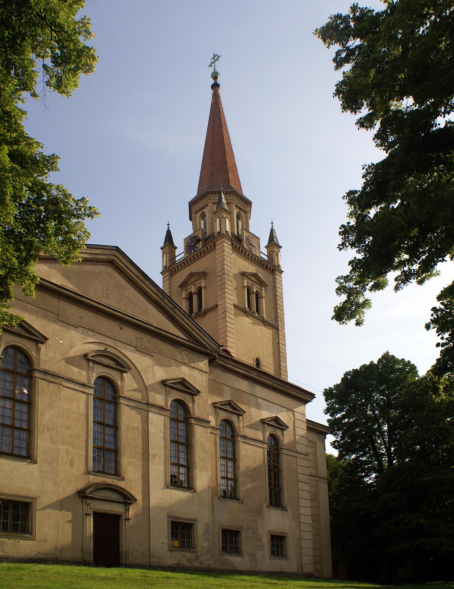 Wałbrzych, pl. Kościelny - Kościół Zbawiciela, 1785-88